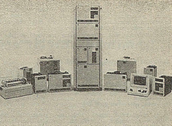 IBM Seria 1